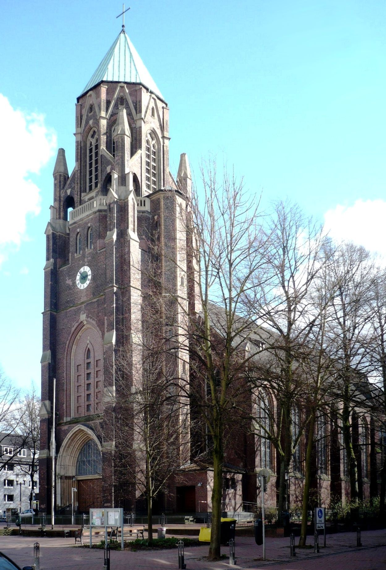 St. Mariä Empfängnis in Essen-Holsterhausen